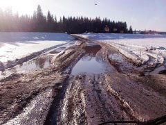 Участок трассы А331 Вилюй.Посёлок Непа.Весна 2015 года.